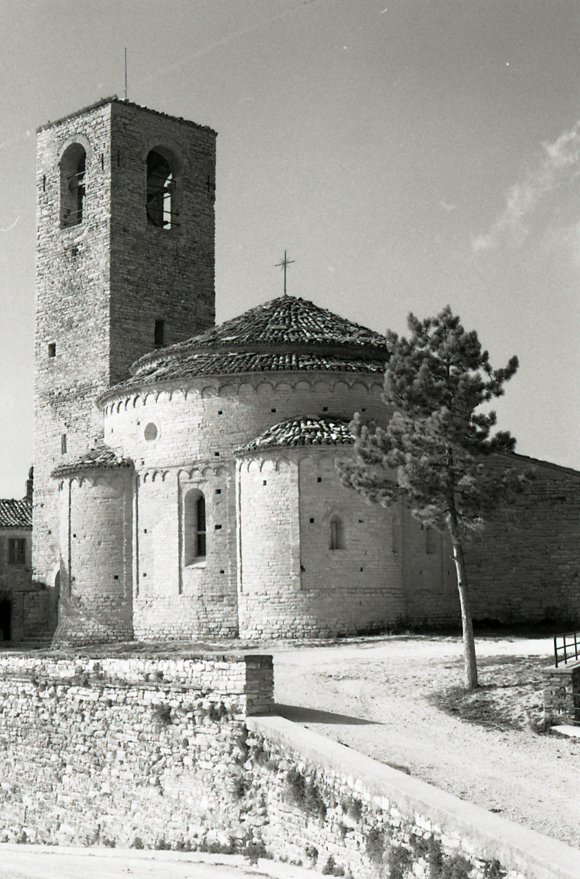 Italia - Marche - Pievebovigliana (MC). Architettura religiosa - Chiese - Elementi architettonici - Marche - San Giusto - Chiesa di San Giusto. . Servizio fotografico : Pievebovigliana, 1969 / Paolo Monti. - Strisce: 5, Fotogrammi complessivi: 25 : Negativo b/n, gelatina bromuro d'argento/ pellicola ; 35 mm. - ((I fotogrammi hanno una doppia numerazione. . - Sul portanegativi: Nikon FP4. - Sul dorso del portanegativi Monti specifica: "Marche.". - Occasione: Documentazione per la pubblicazione: "TOURING CLUB ITALIANO, Marche, Milano, TCI, 1971". - Fonte: Agenda di Paolo Monti: Monti/ 3 aprile 1966 - 9 marzo 1971/ 12421-16823 (1966-1971), presso Archivio Paolo Monti. - Fonte: Monografia: TOURING CLUB ITALIANO, Marche, Milano, TCI, 1971 (1971). - Fonte: Agenda di Paolo Monti: Monti - Agenda 1969 (1969), presso Archivio Paolo Monti